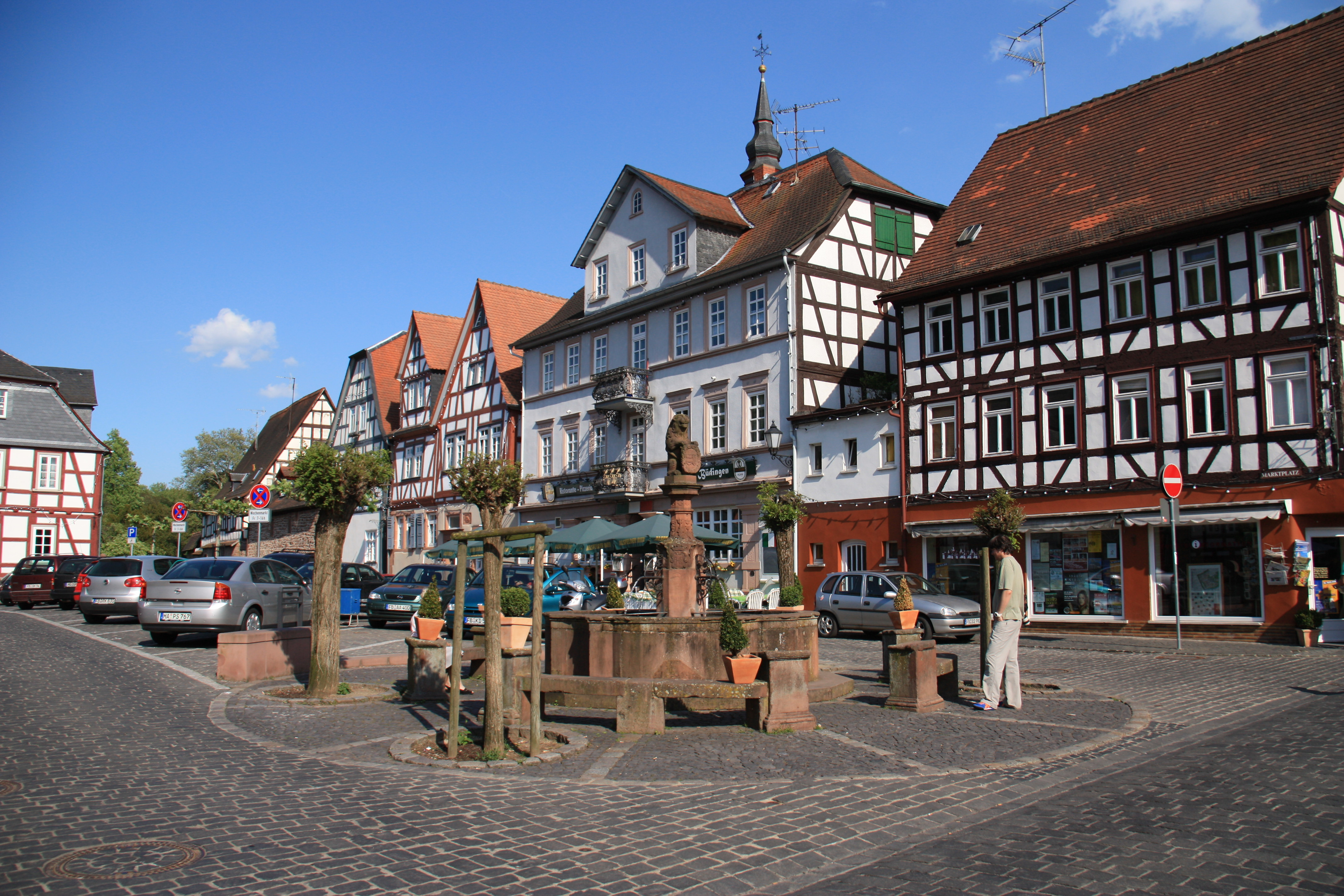 Büdingen Marktplatz